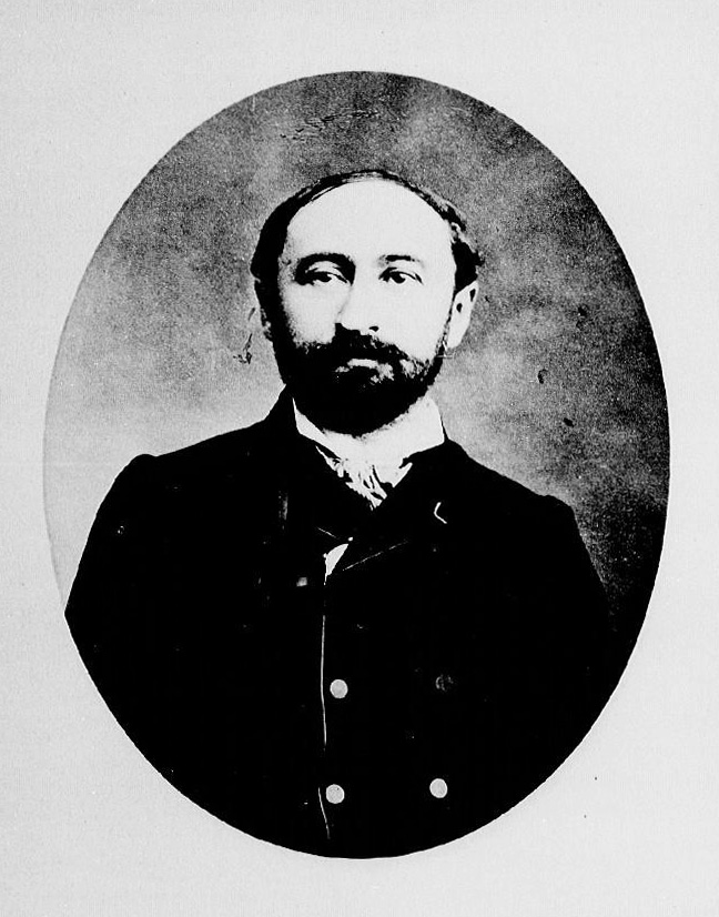 Eugène Müntz, Biographies alsaciennes avec portraits en photographie, série 3